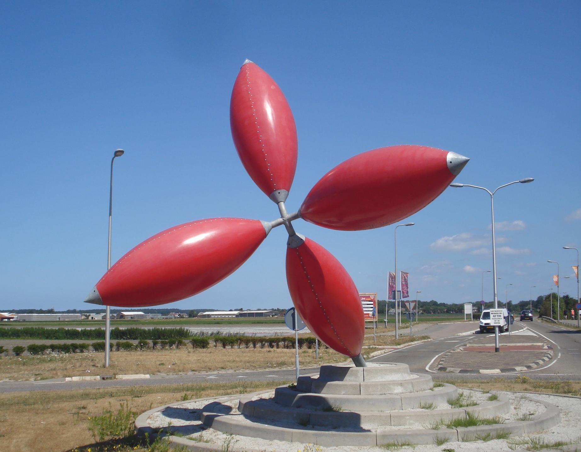 Noordwijkerhout, Rotonde bij Leeuwenhorst (scho. Kunstwerk "Rode Zon" van Jos Hachmang. The Netherlands. The photographical reproduction of this work is covered under the article 18 of the Dutch copyright law, which states that “it is not an infringement of copyright to reproduce and publish pictures of a work, as meant in article 10, first paragraph, under 6°[1] or of an architectural work as meant in article 10, first paragraph, under 8°[2], which are made to be permanently located in a public place, as long as the work is depicted as it is located in the public space. Where incorporation of a work in a compilation is concerned, not more than a few of the works of the same author may be included”. [1] drawings, paintings, works of architecture and sculpture, lithographs, engravings and the likes [2] drafts, sketches and three-dimensional works relating to architecture, geography, topography or other sciences Note that photographs are not included in Item 6. They are separately listed at Item 9 and are therefore not covered by FOP. See COM:CRT/Netherlands#Freedom of panorama for more information. .